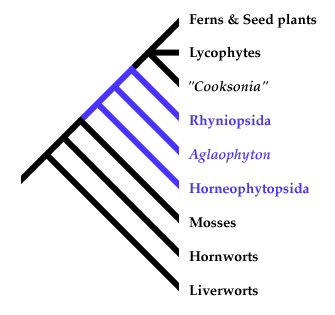 Cladogram showing "rhyniophytes"